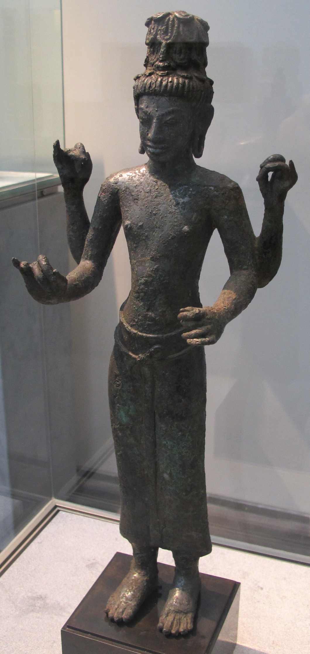 Thailandia, bodhisattva maitreya da prakon chai, viii sec